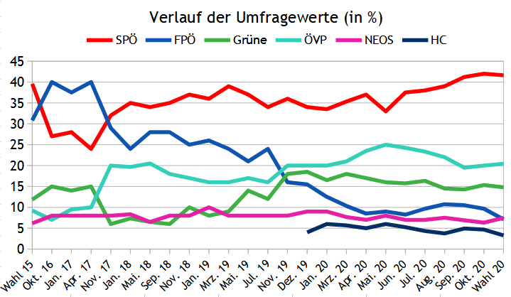 Wien-Landtagswahl 2020 Umfragen